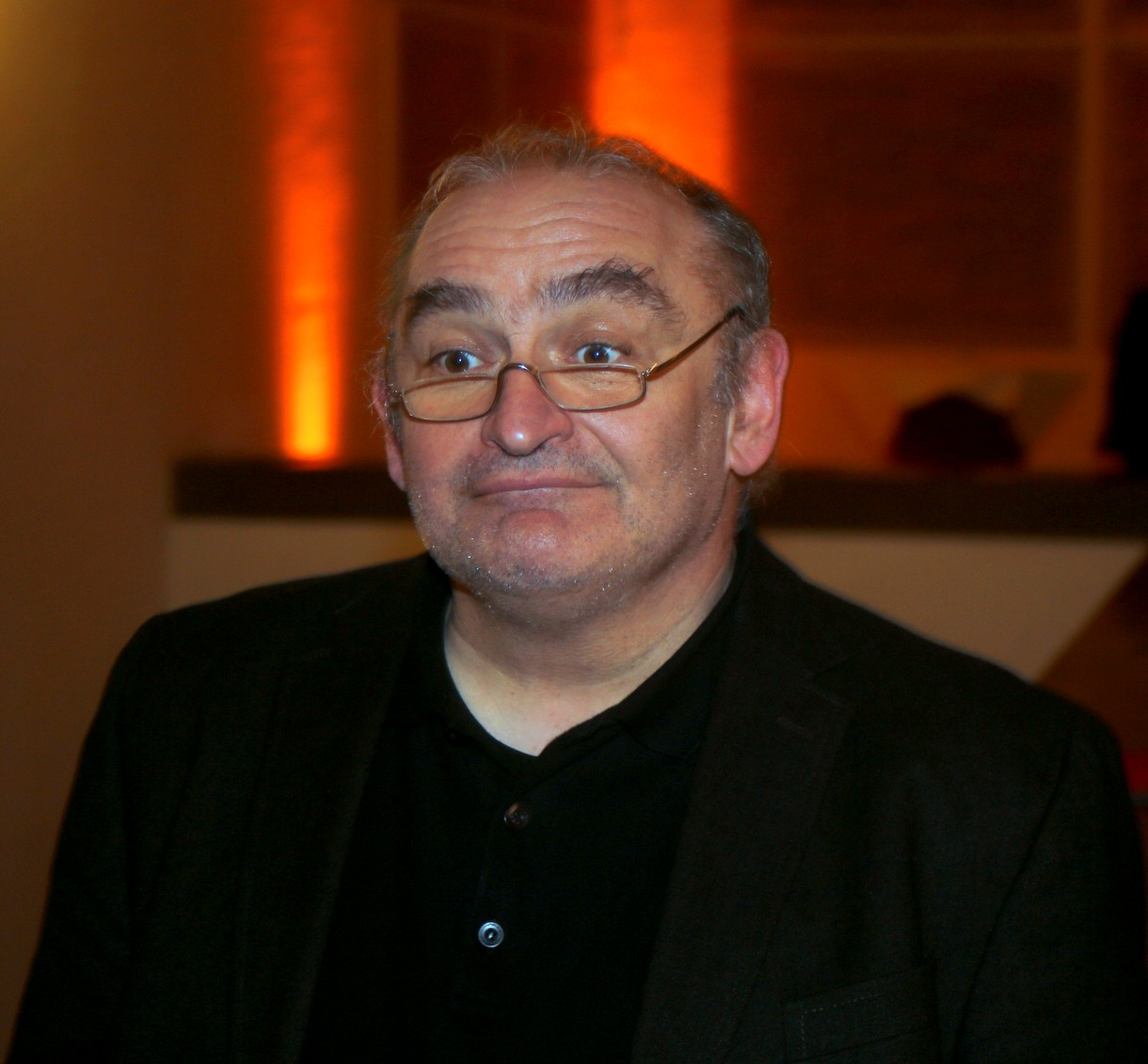 Siegfried "Sigi" Zimmerschied, deutscher Kabarettist und Schauspieler. Hier am Abend des 2. März 2015 während des Empfangs des Münchner Oberbürgermeisters Dieter Reiter für in München lebende und arbeitende Schauspieler im Alten Rathaus in München. Titel des Werks: "Sigi Zimmerschied (2015) im Alten Rathaus (München)"